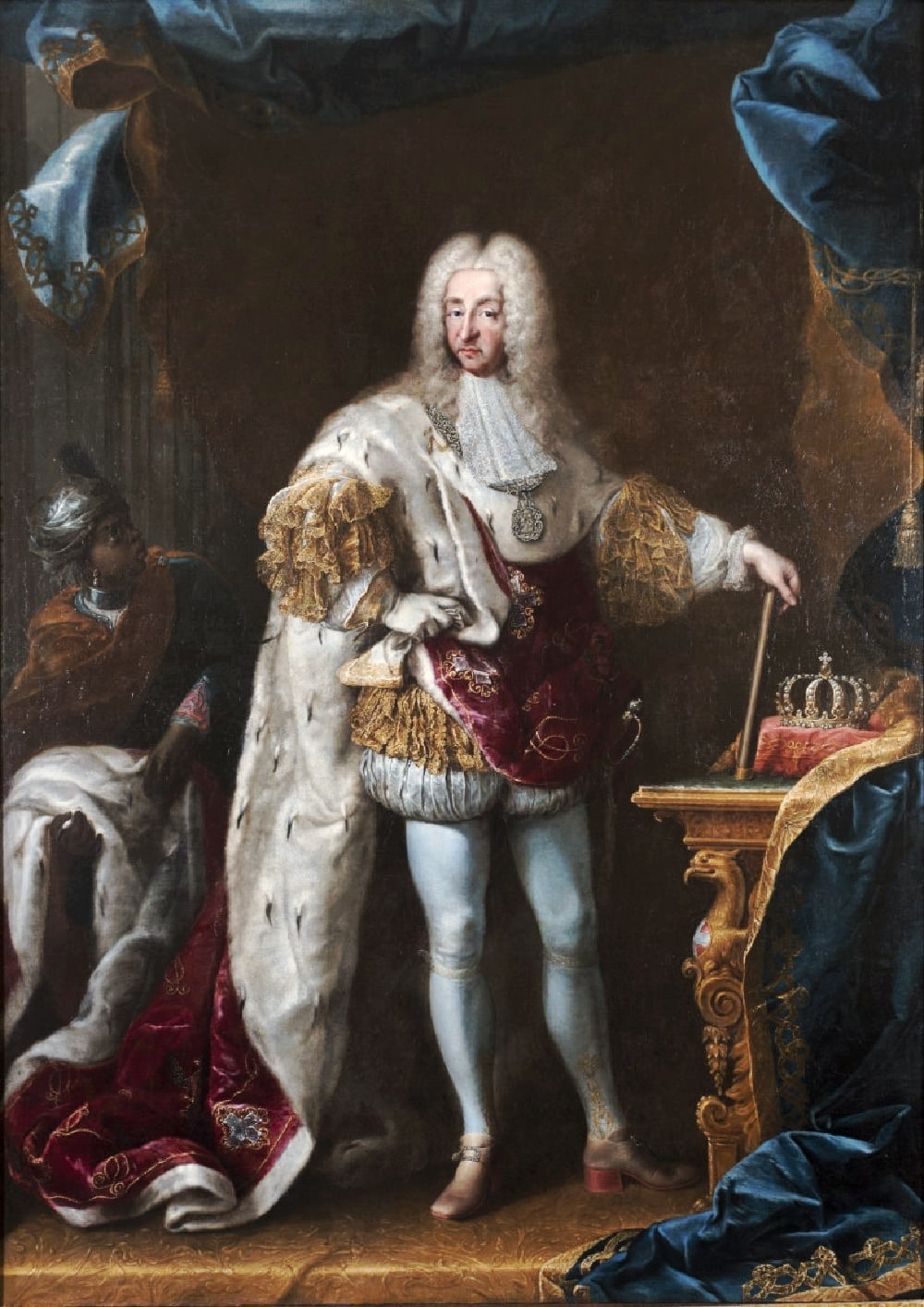 Re Vittorio Amedeo II di Savoia (1666–1732), con le Isegne Regali come Re di Sardegna